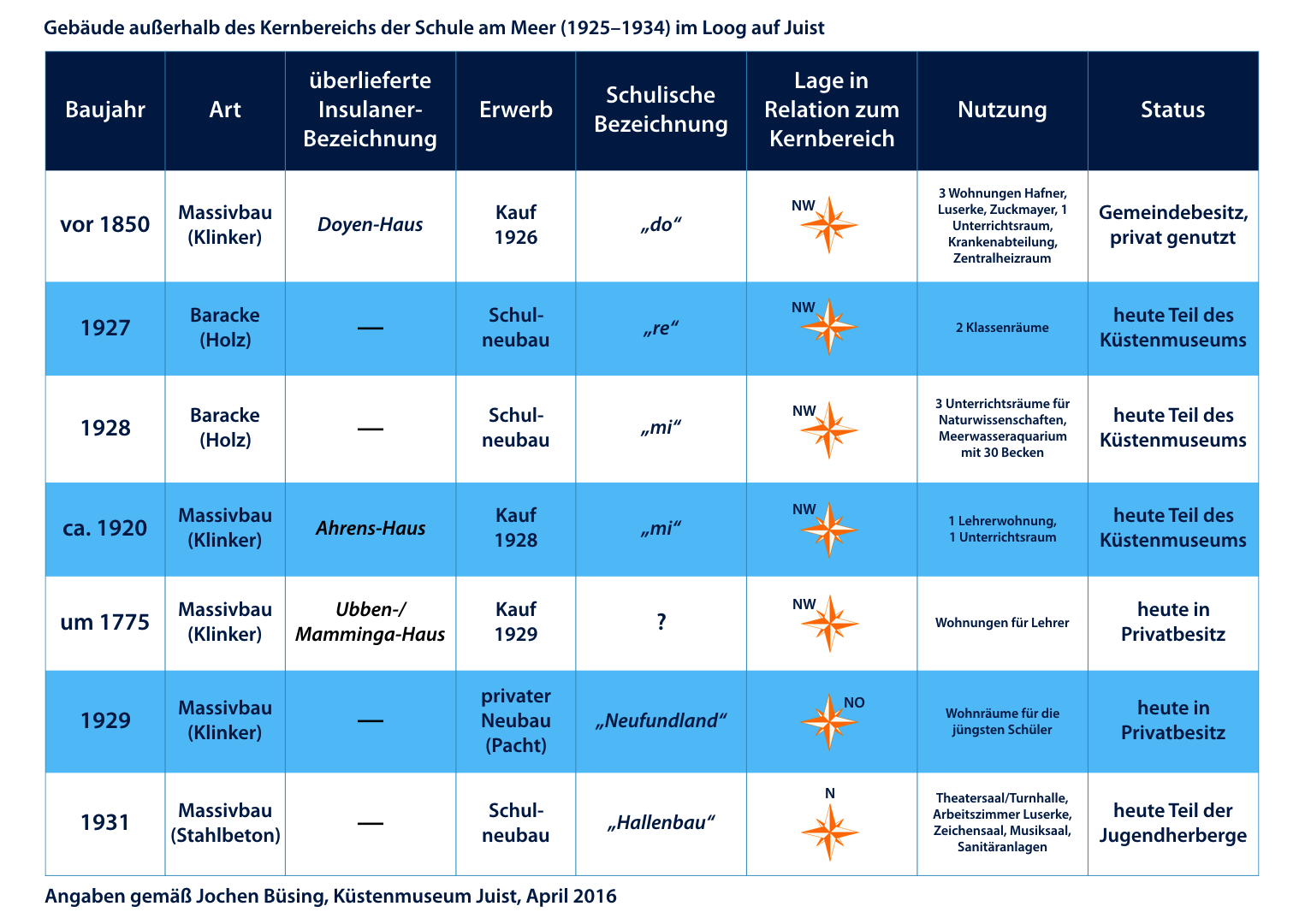 Gebäude außerhalb des Kernbereichs der reformpädagogischen Schule am Meer (1925–1934) von Martin Luserke auf der Nordseeinsel Juist.